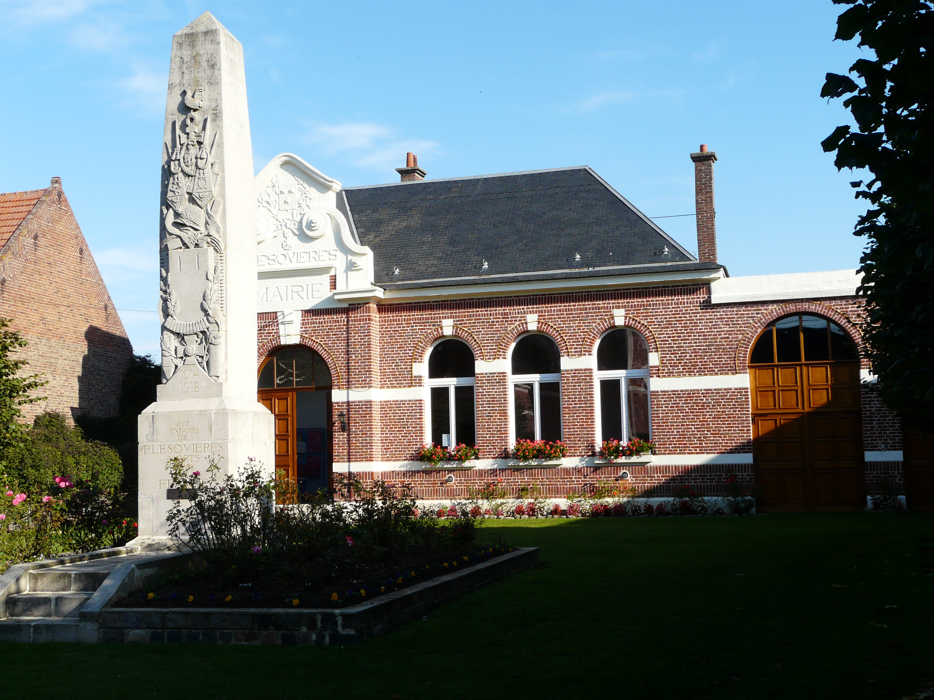 Mairie de Flesquières (Nord, France)